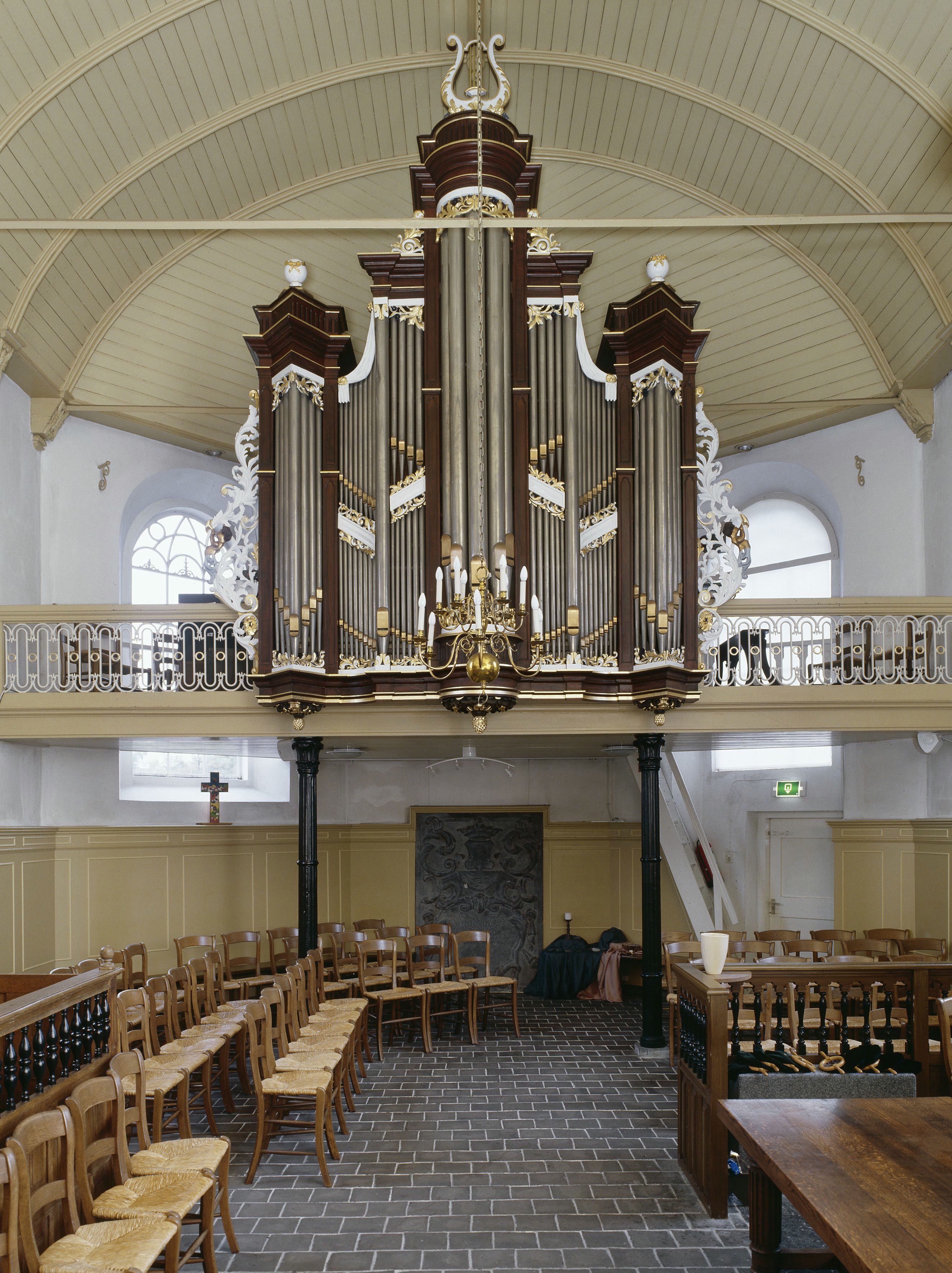 De Hofkerk: Interieur, aanzicht orgel, orgelnummer 597 (opmerking: Gefotografeerd voor Het Historische Orgel in Nederland 1878-1886, Bladzijde 78)